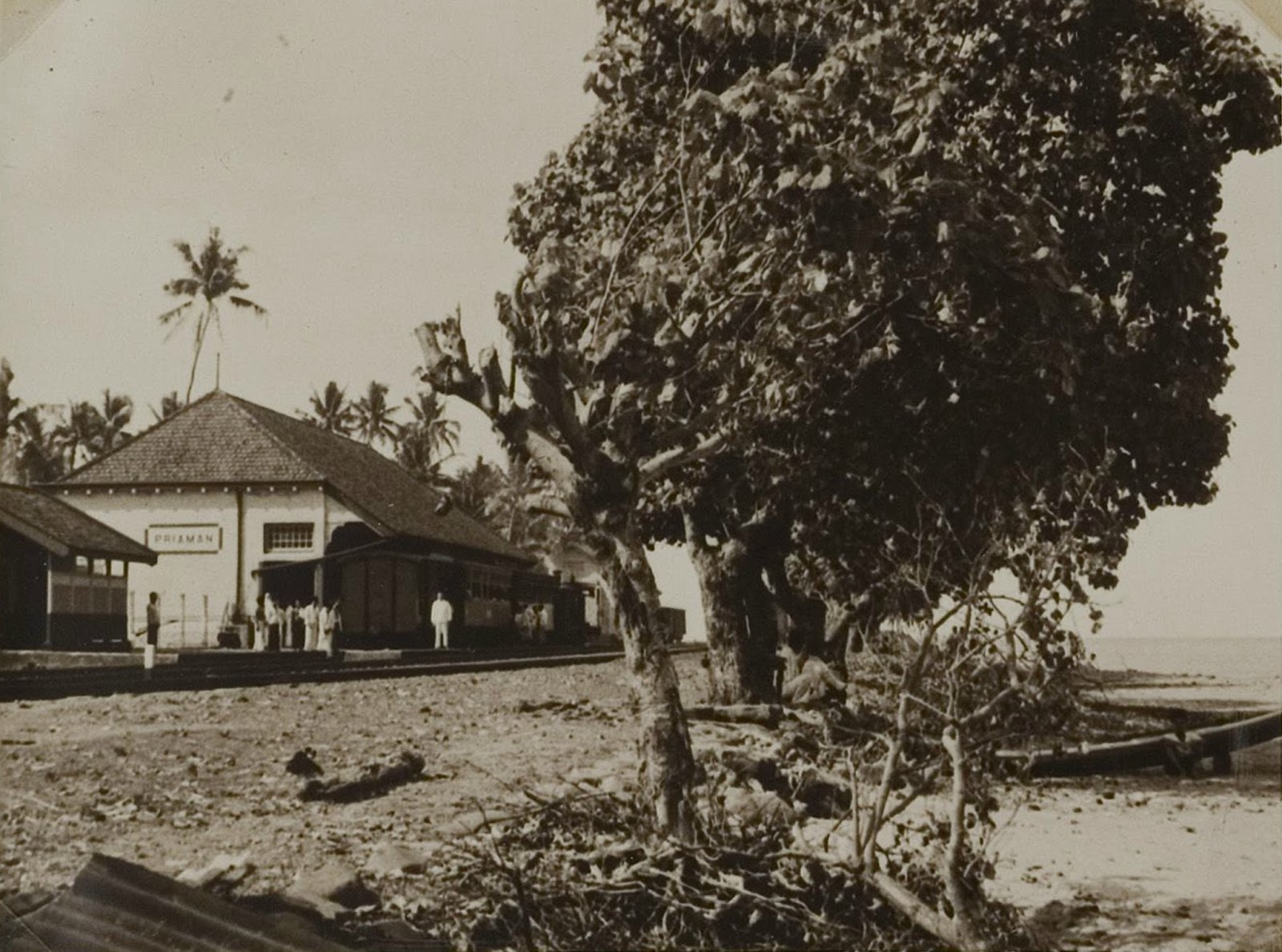 Bahnhof Pariaman der damaligen Staatsspoorwegen ter Sumatra's Westkust